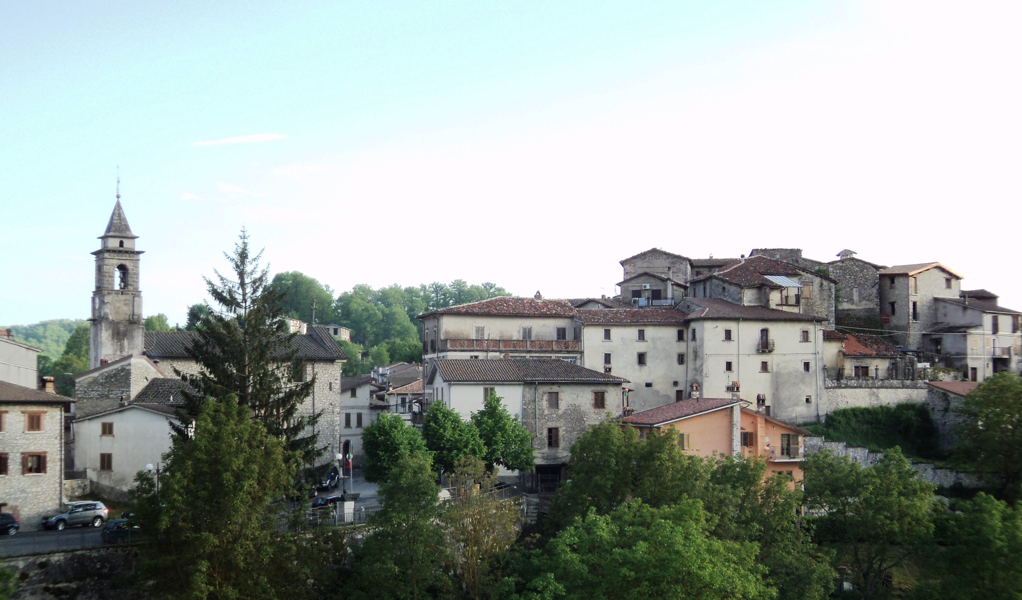 foto leofreni